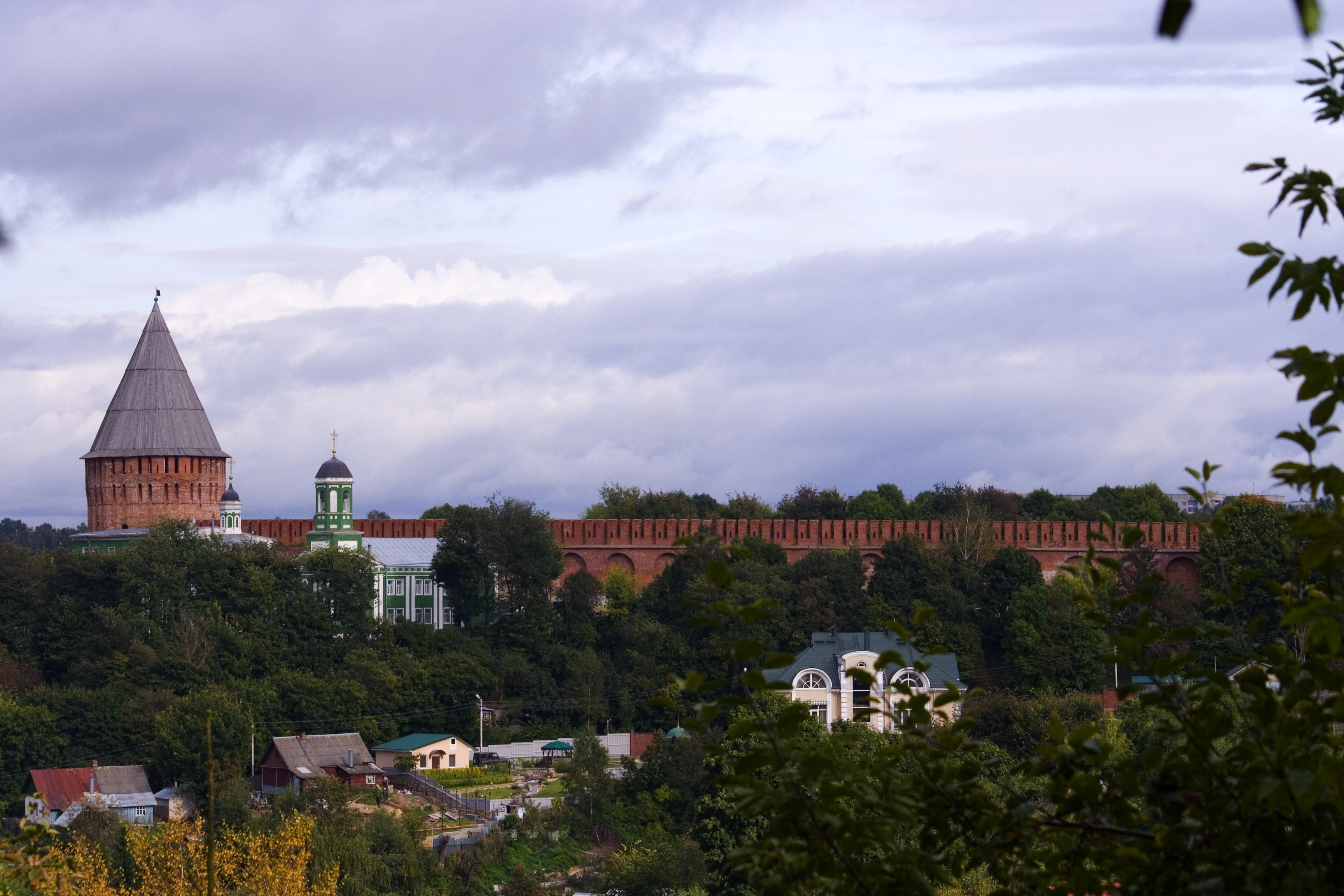 Вид на Смоленский кремль